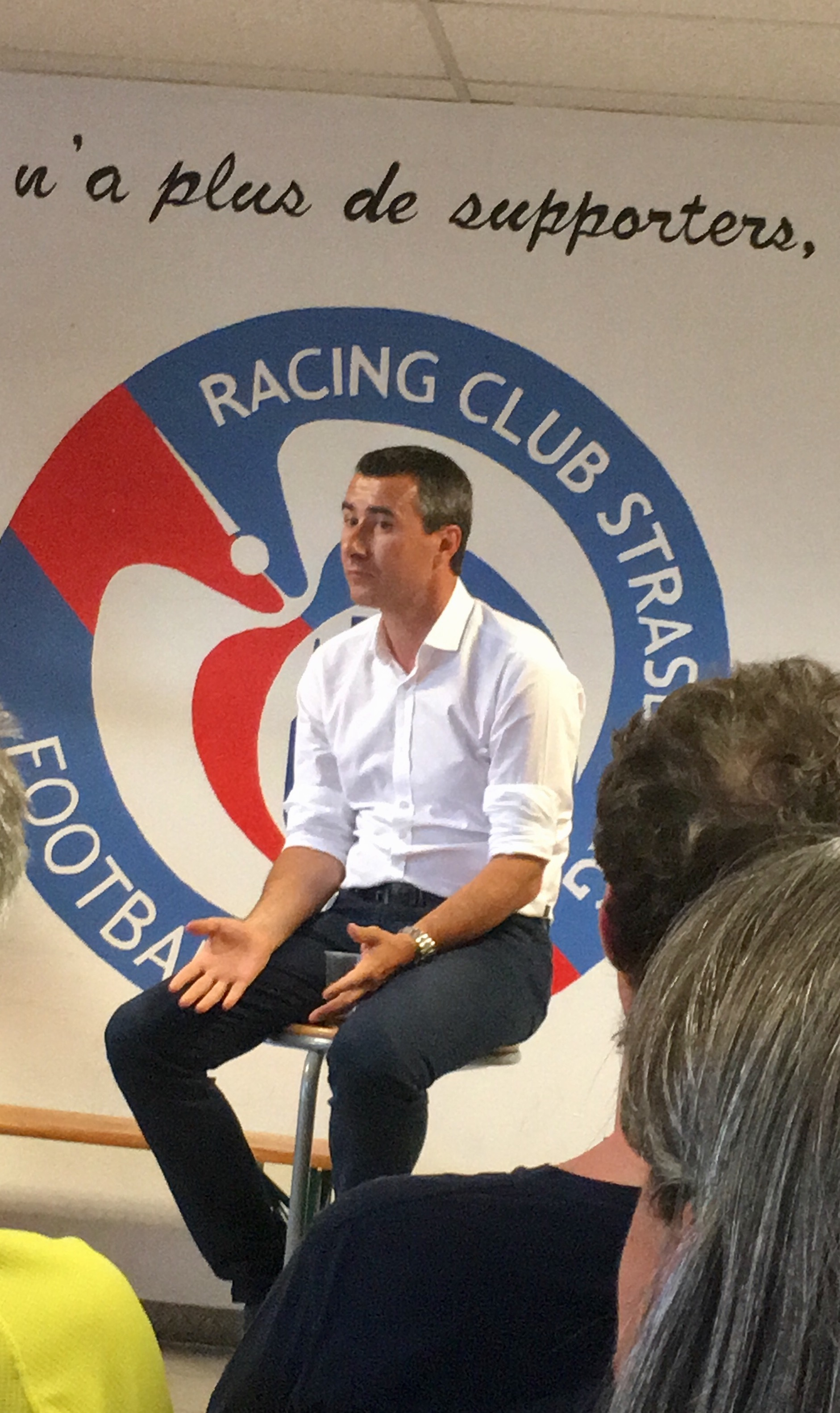 Marc Keller, président du RC Strasbourg rencontre les supporters du Club pour répondre aux questions et parler de la stratégie du RCSA. Il vient à la rencontre des supporters du RCS tous les ans.